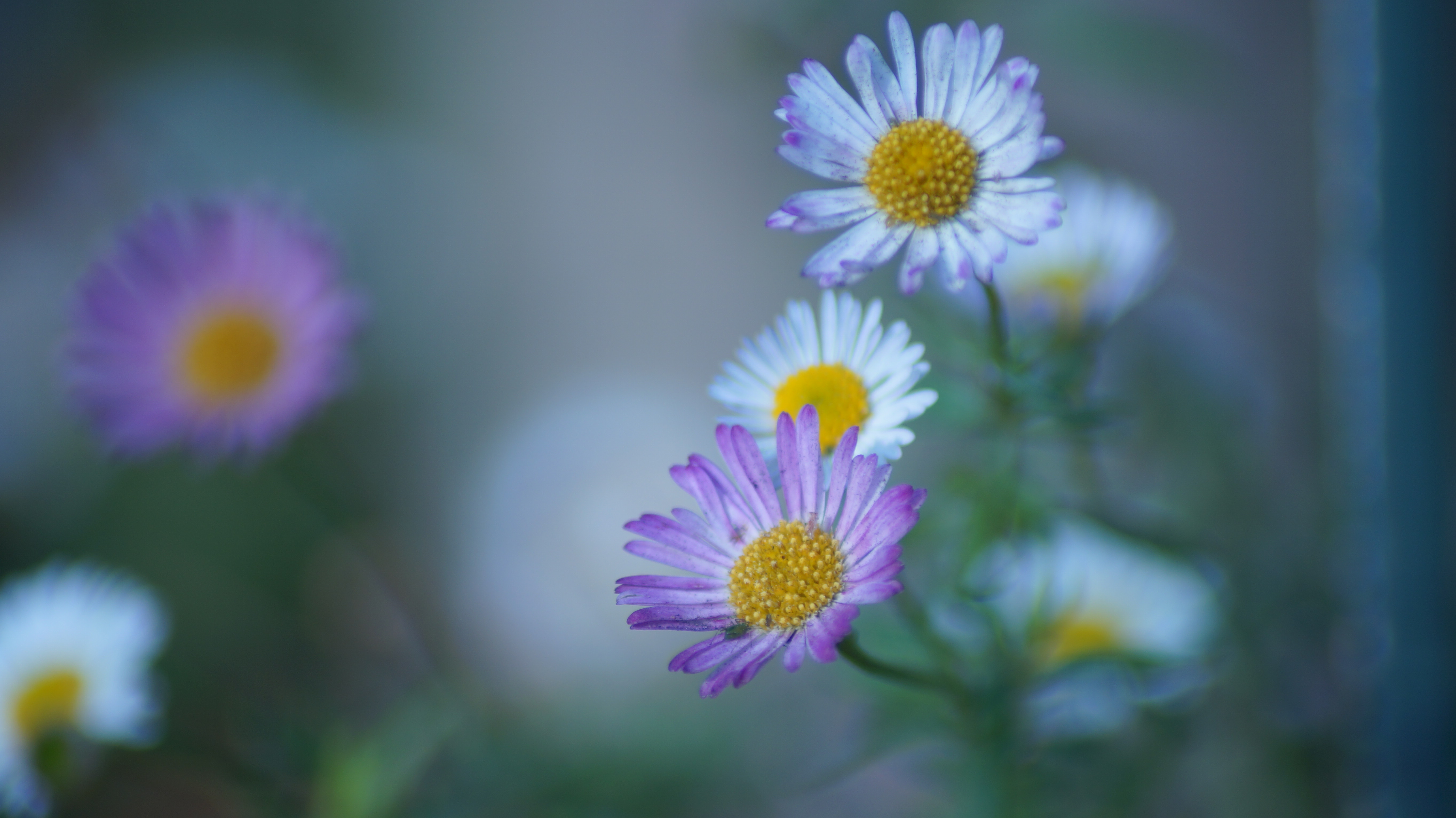 Gefunden in Dornbirn, Vorarlberg am Fuße eines gepflanzten Baumes in der Stadt.